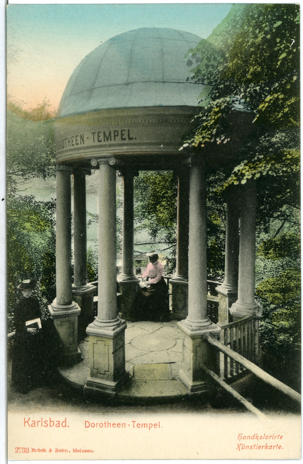 Karlsbad; Dorotheentempel